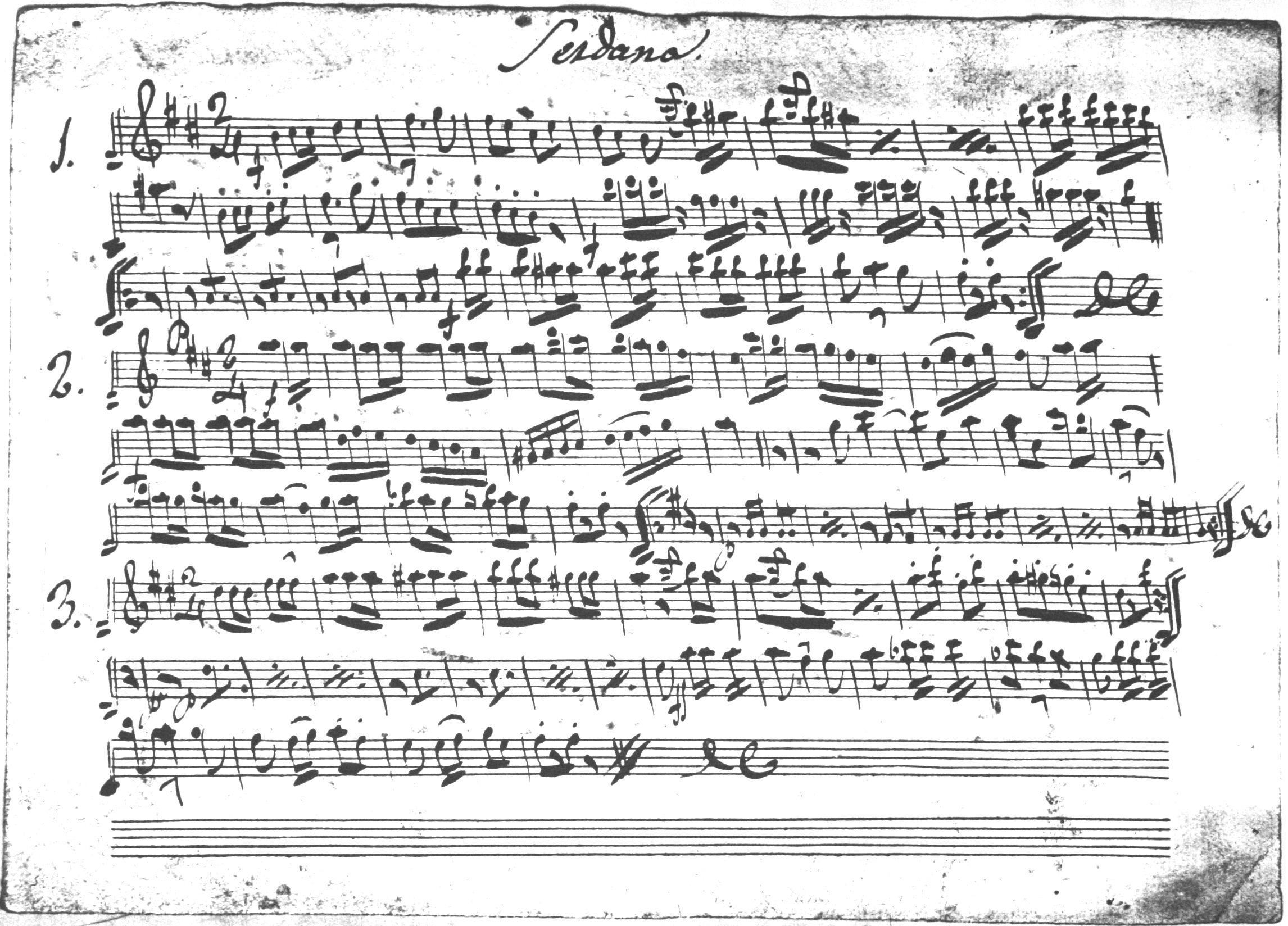 Portada del tractat de teoria musical de Joaquim Sarret i Arbós